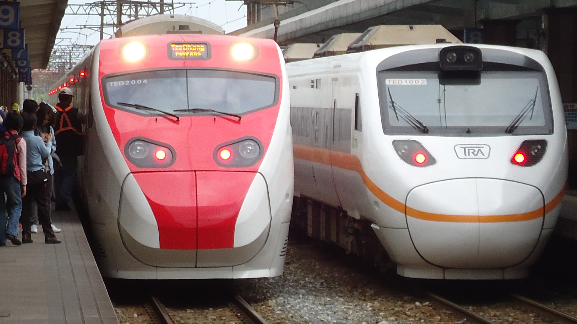 中文（台灣）: 停在臺灣鐵路管理局花蓮車站的普悠瑪號列車TED2004與太魯閣號列車TED1002。